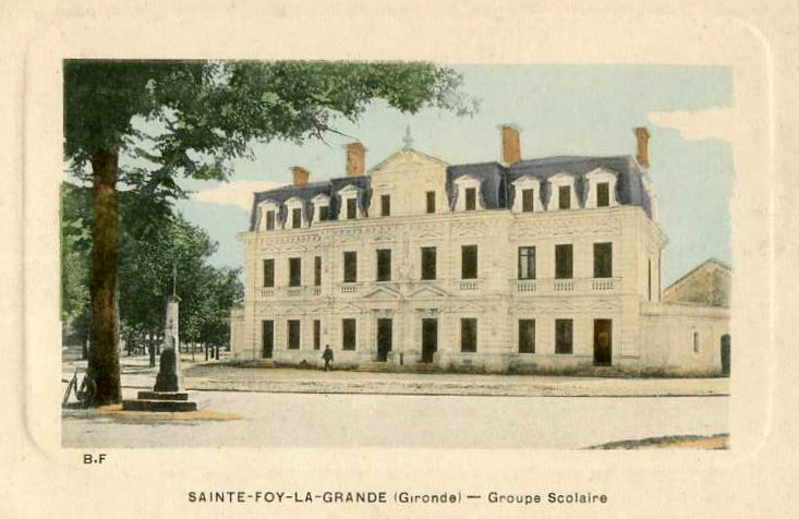 Saint-Foy-la-Grande